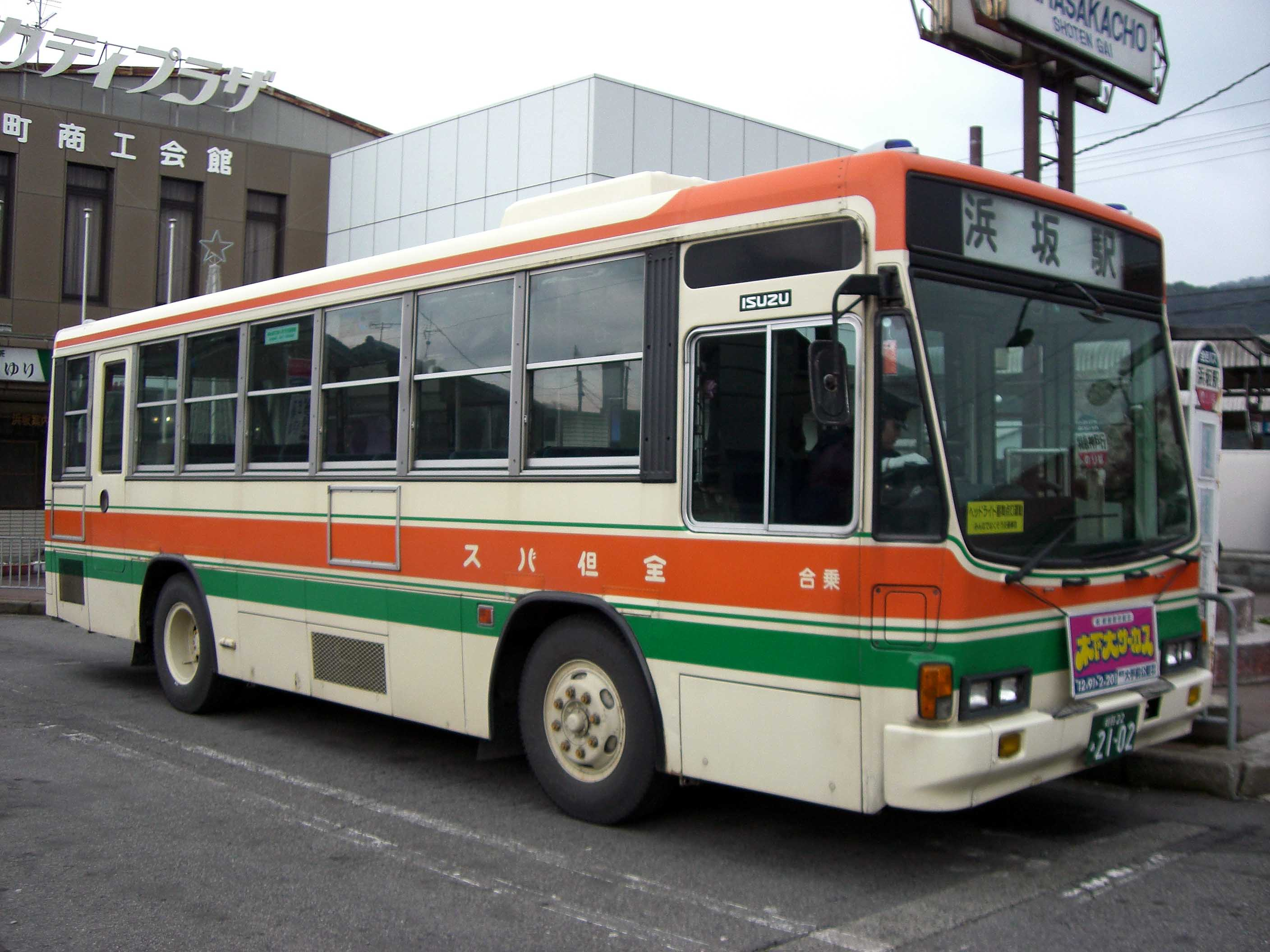 全但バス、浜坂駅前にて